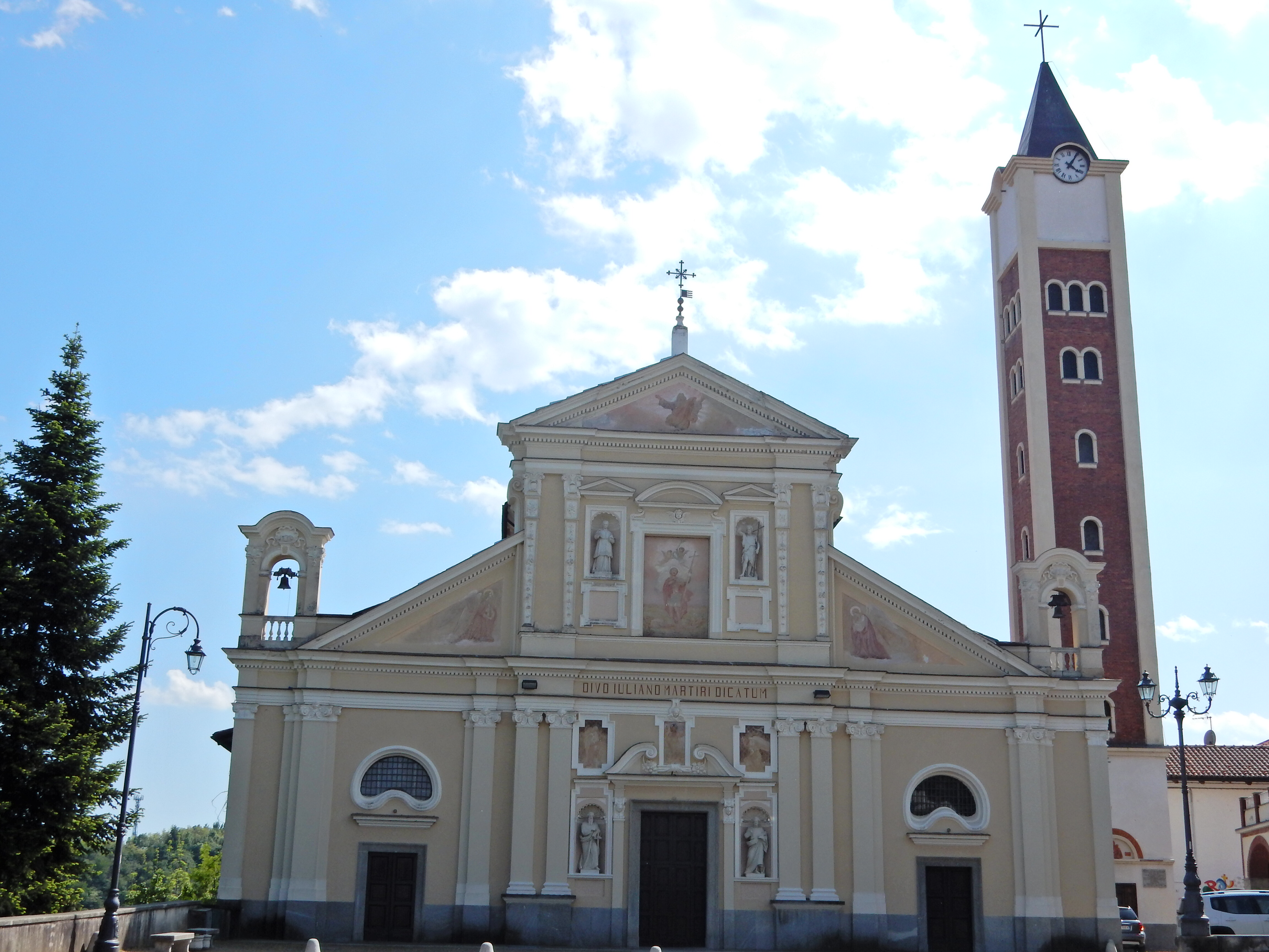 Chiesa di S.Giuliano Martire